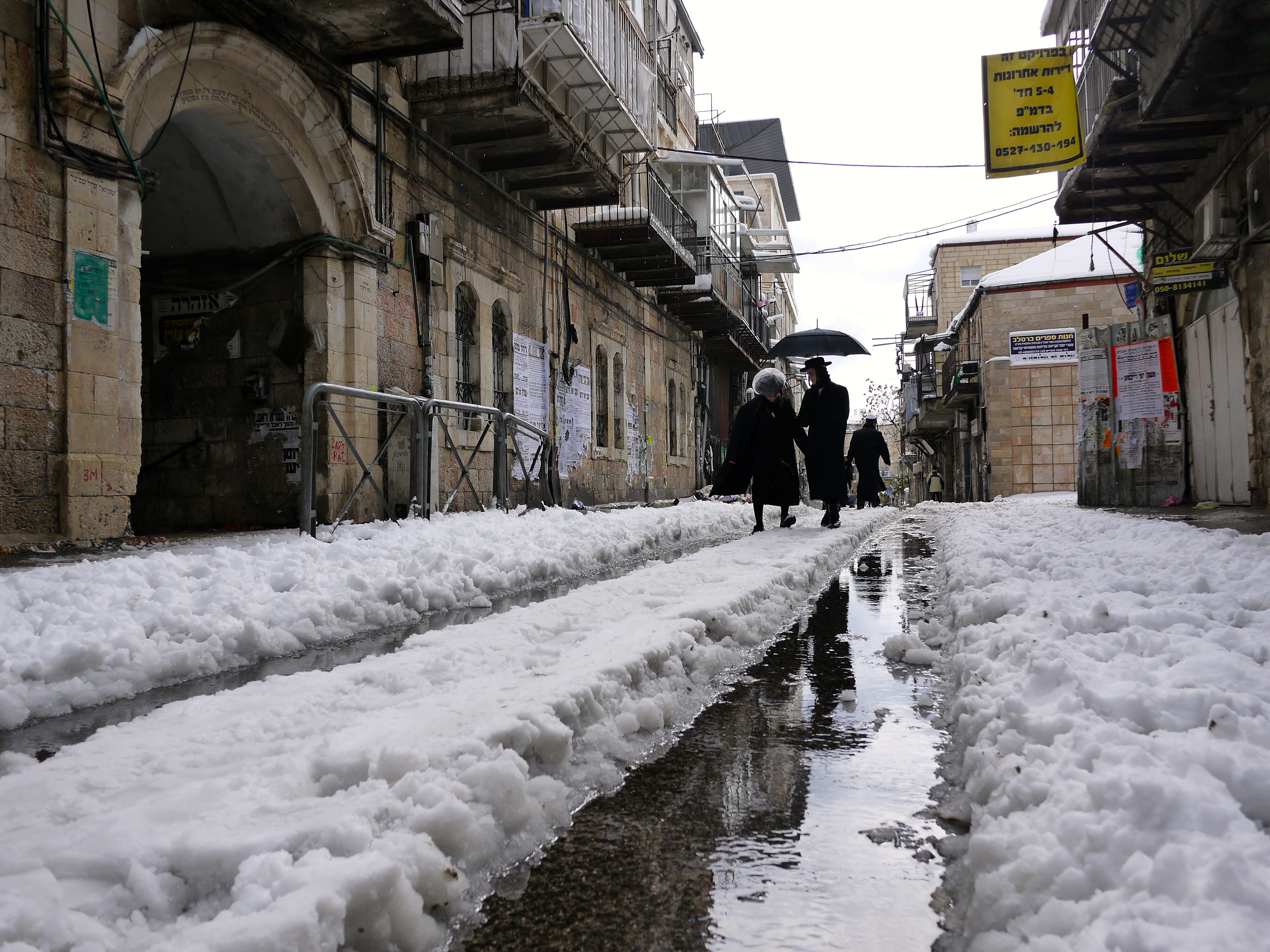 Mea She'arim Jerusalem